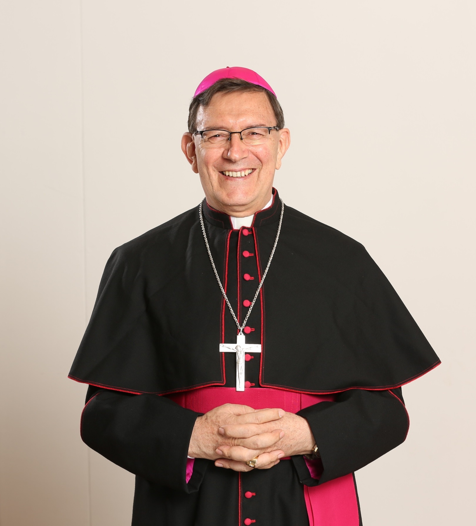 Monseñor José Crispiano Clavijo Méndez, Obispo Titular de la Diócesis de Sincelejo.